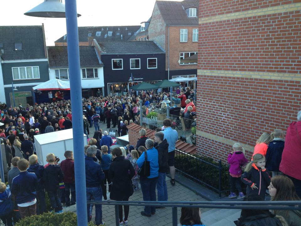 Over 800 mennesker var samlet på torvet